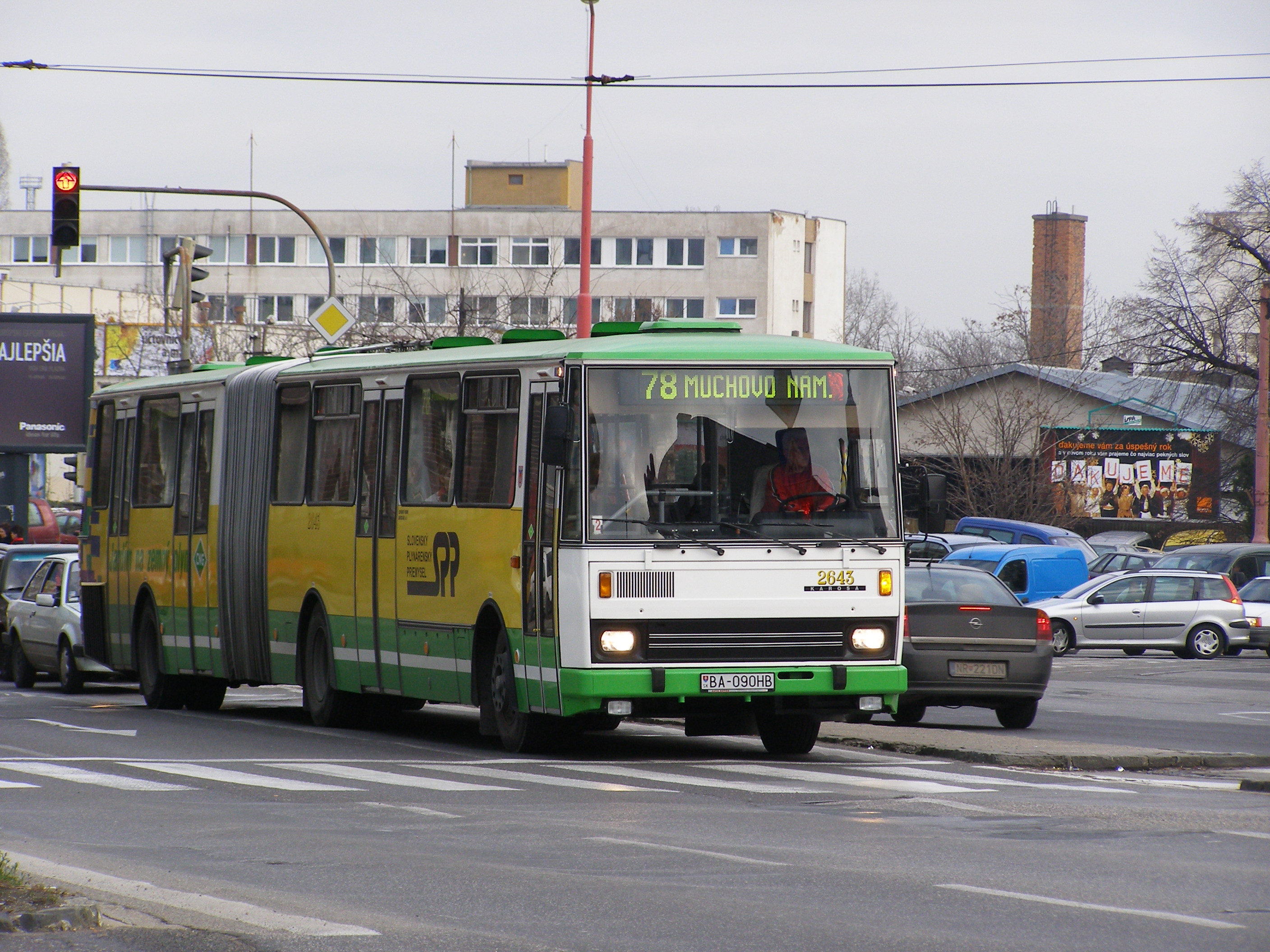 Bus Karosa B741, Malá Scéna, Bratislava. Year built 1991.